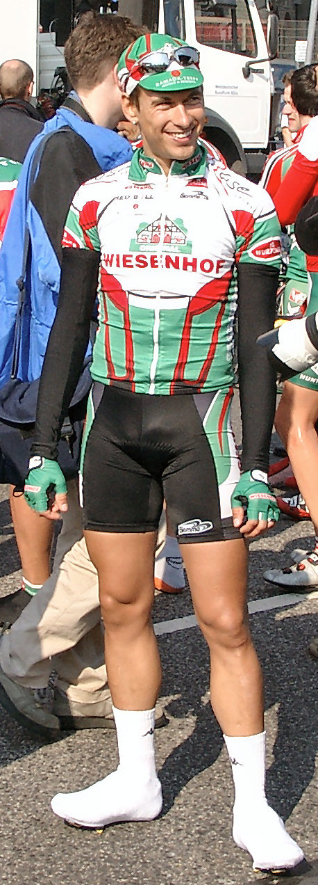 Björn Schröder at race in Cologne